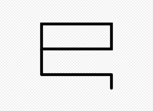 Тамга (герб) племені баяндур